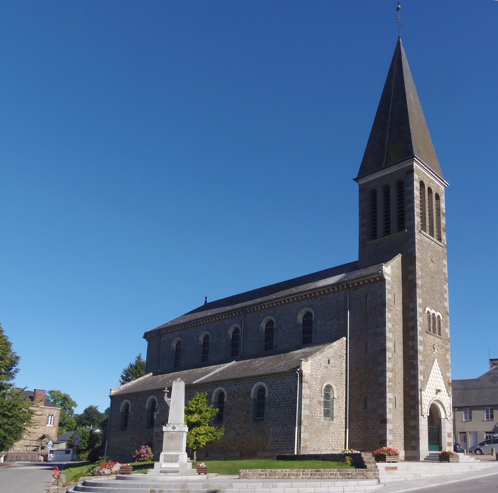 Montilly-sur-Noireau (Normandie, France). L'église Saint-Pierre.